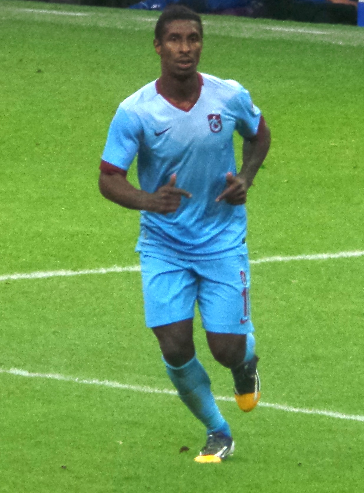 Kévin Constant